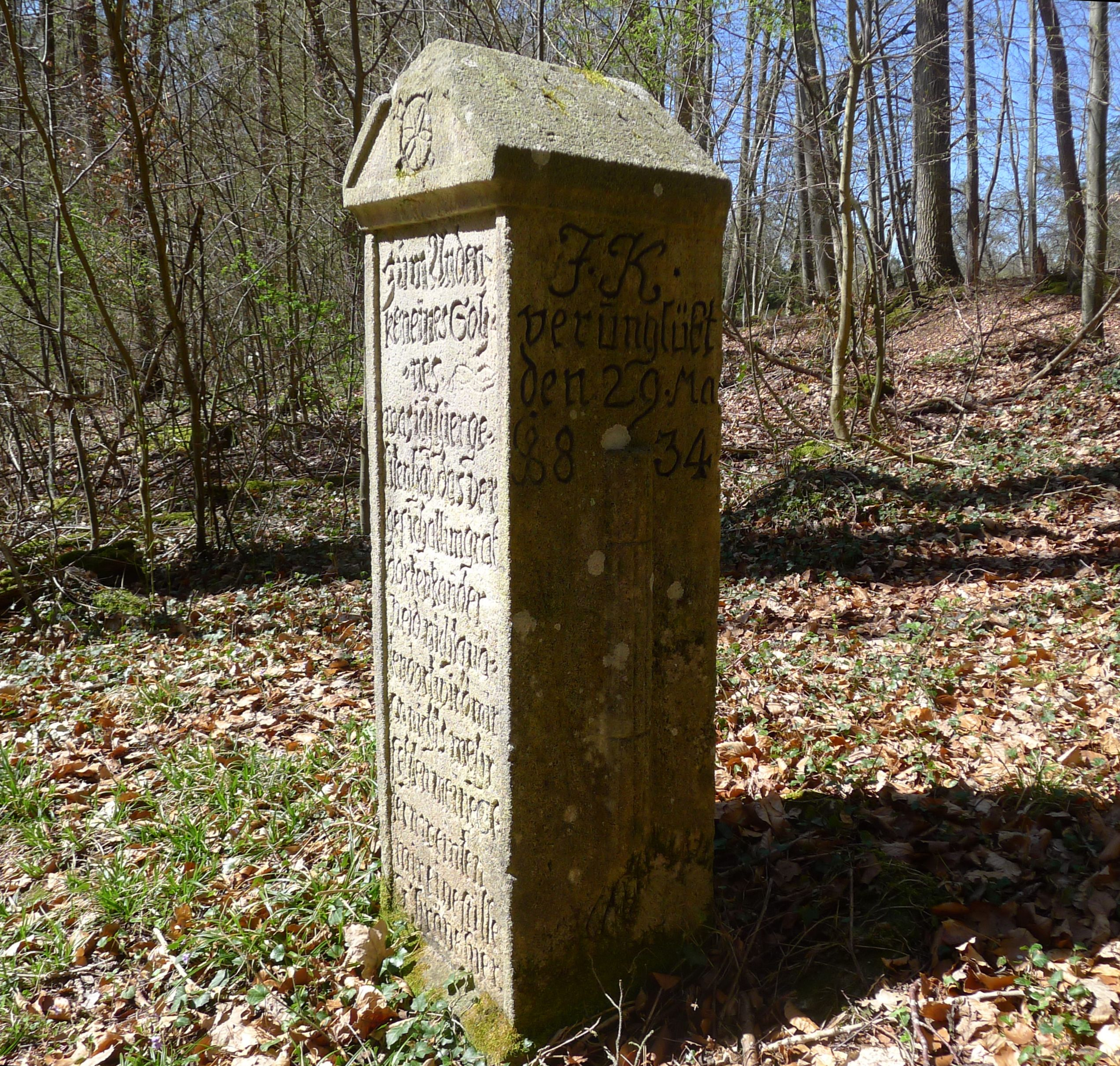 Gedenksteen Jakob Kämmerle, genoemd in Untere Kleinmichelesmühle, Siebenmühlental (Stuttgart) 48° 38' 28,3380" N, 9° 10' 46,7580" E